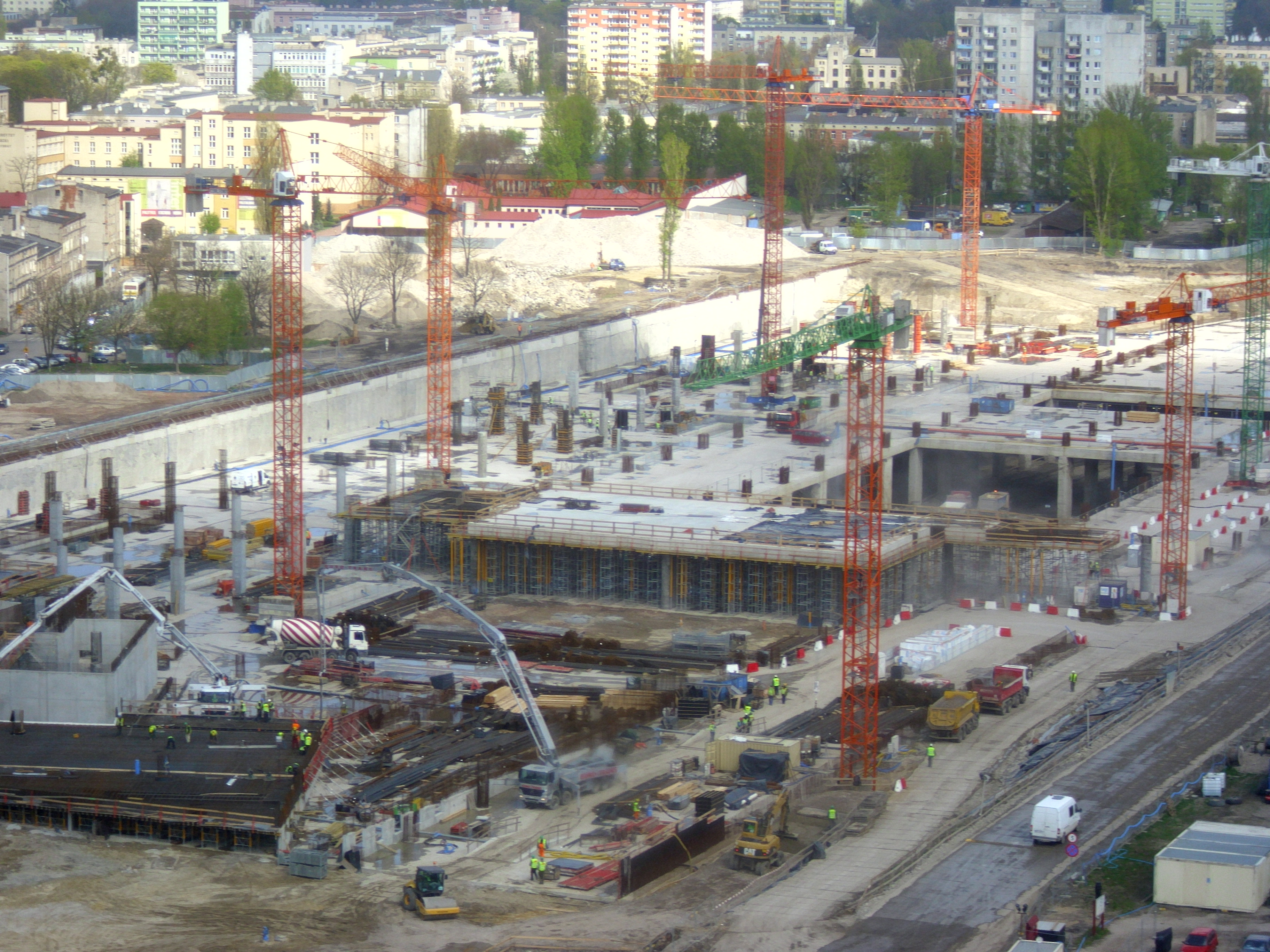 Budowa nowego dworca kolejowego Łódź Fabryczna wraz z budową Nowego Centrum Łodzi